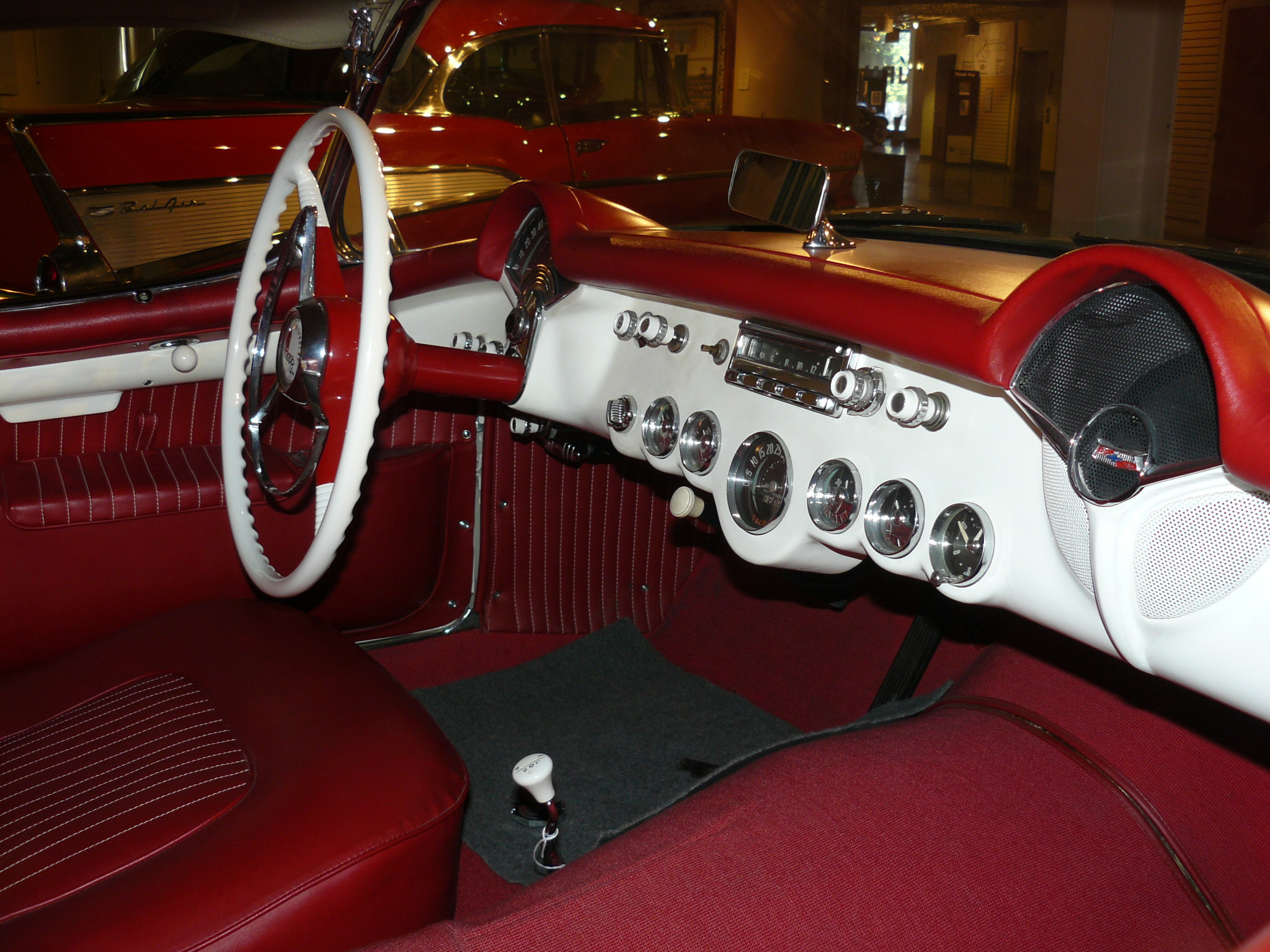 Auburn Muséum.